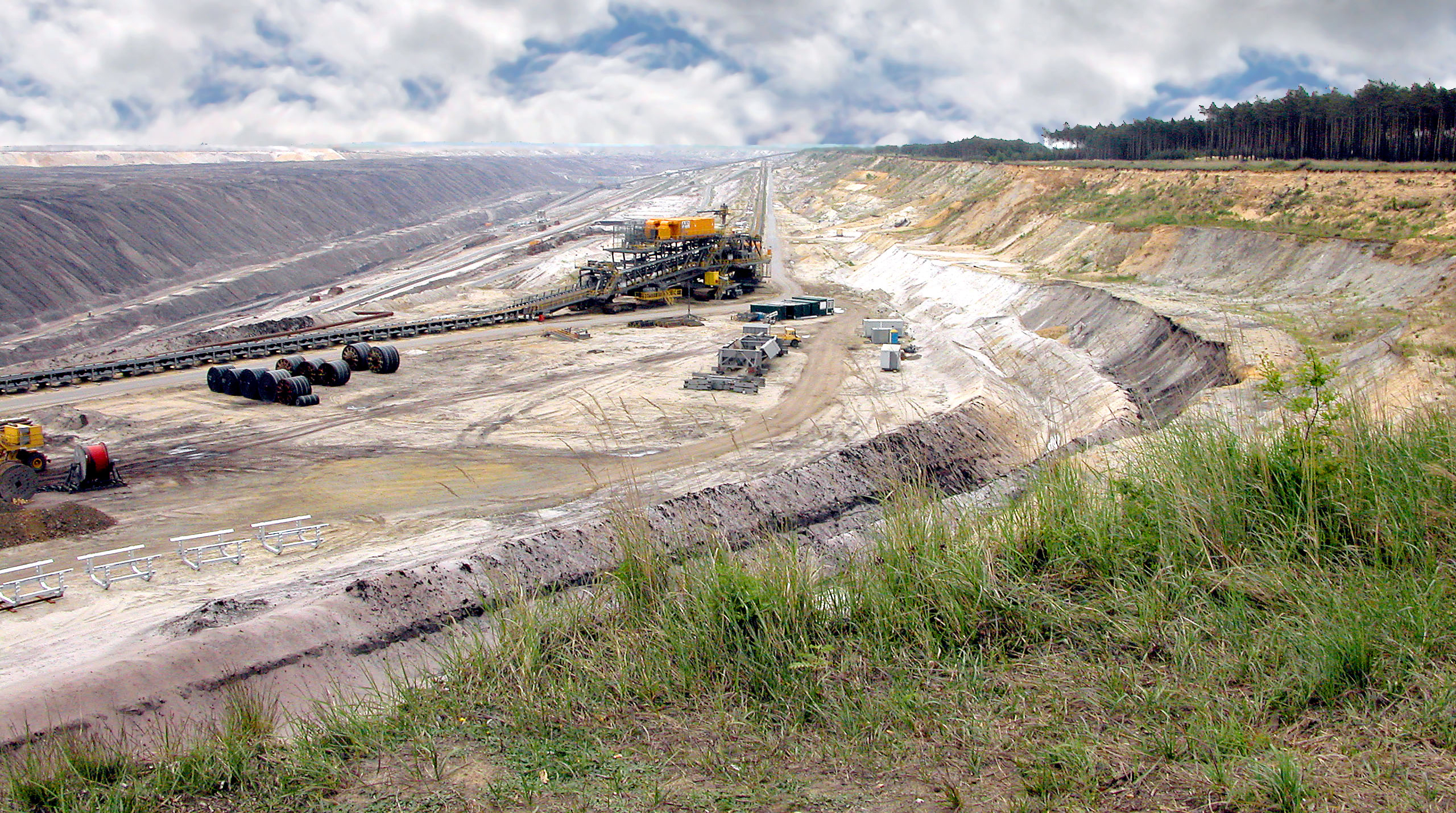 21.05.2005 03119 Welzow: Blick in den Braunkohletagebau Welzow-Süd. [DSCN6637.TIF]20050521010DR.JPG(c)Blobelt